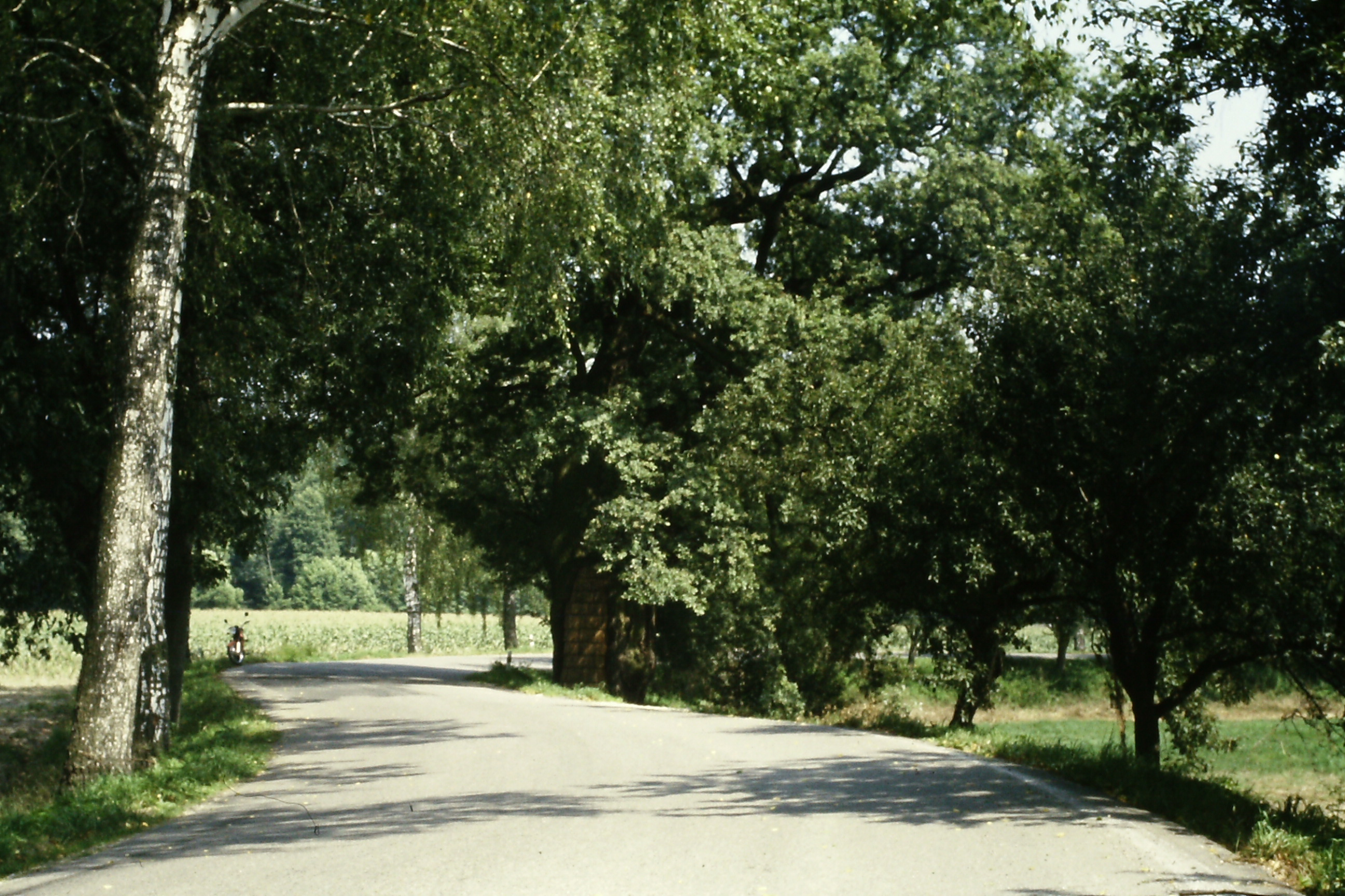 Žižkův dub